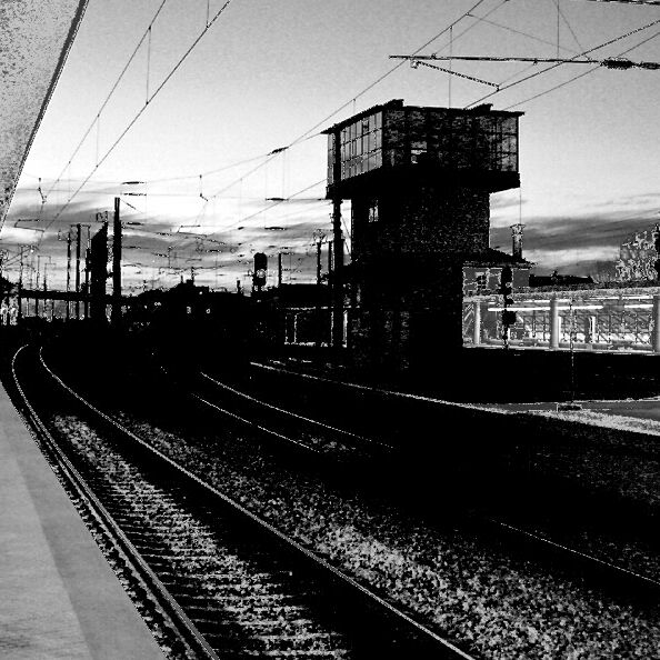 Aspeto da torre em 2006, não integrada nas plataformas e vias da estação.